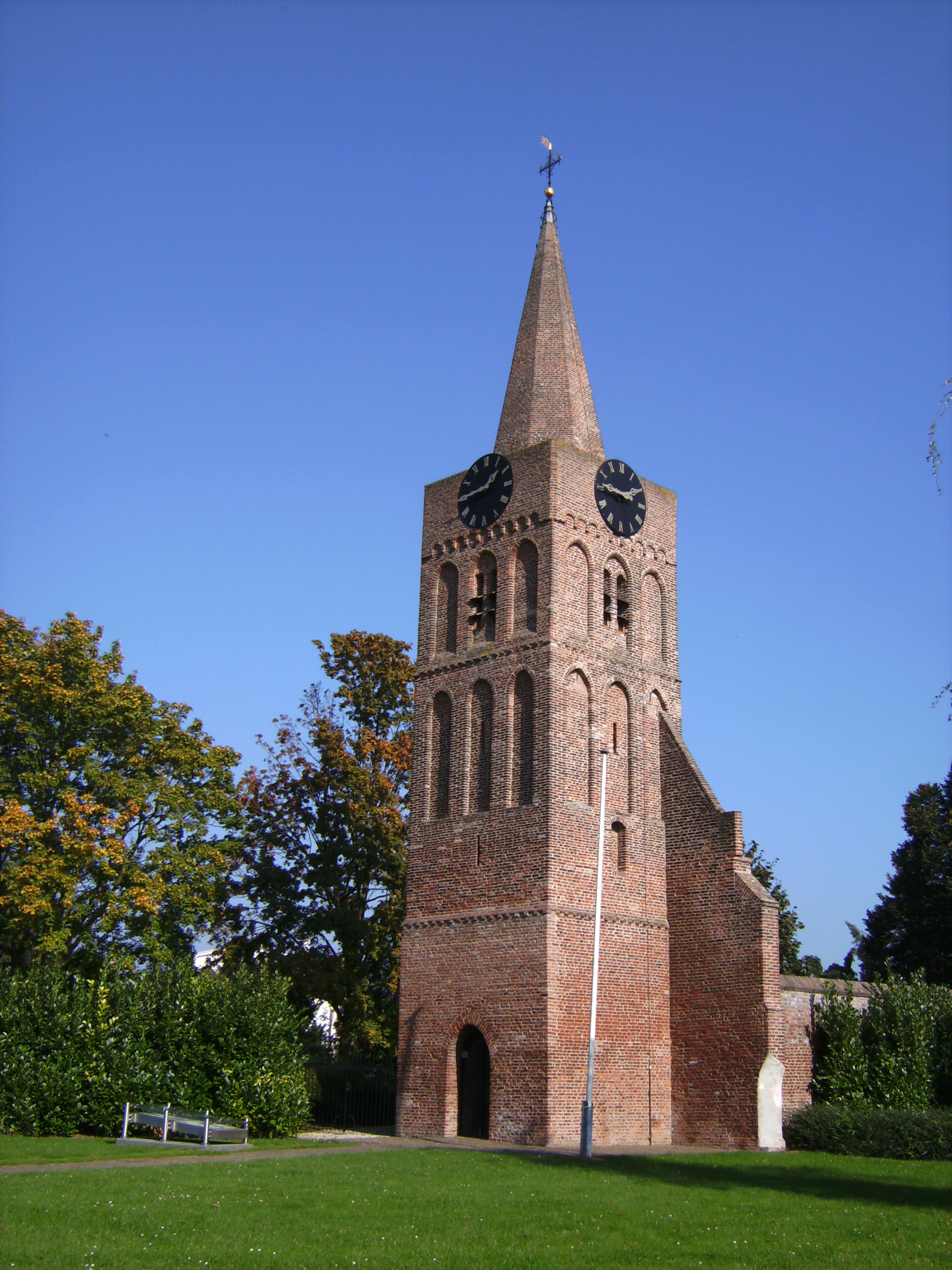 Andel, toren